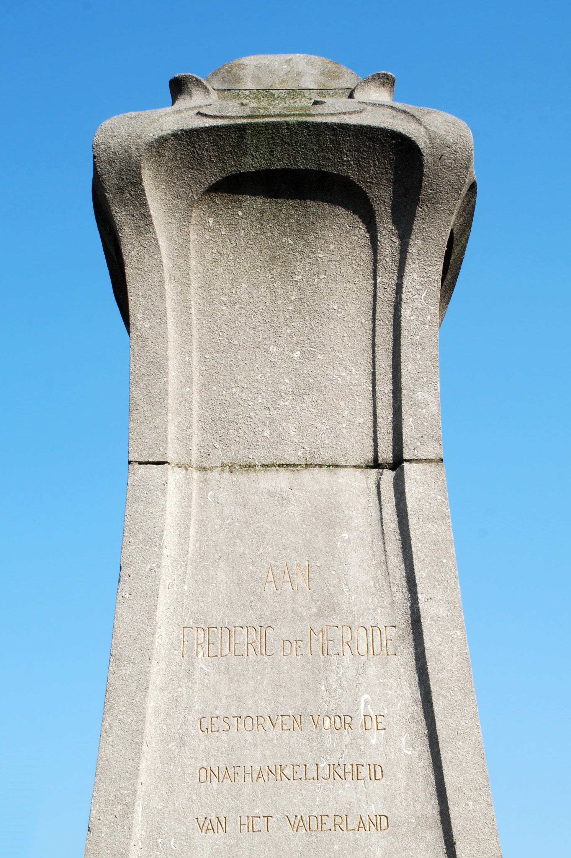 Belgique - Bruxelles - Monument au comte Frédéric de Mérode